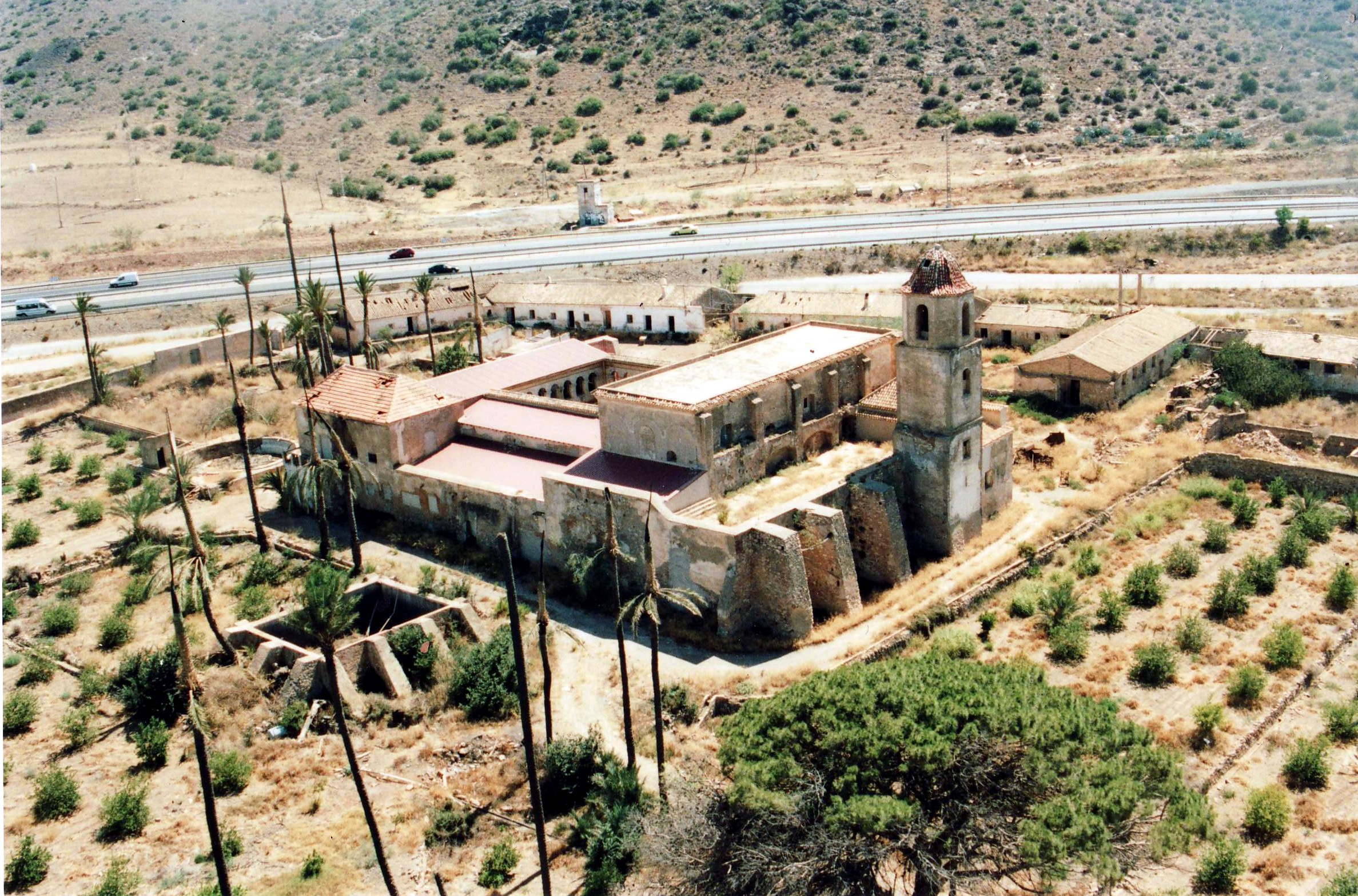 Monasterio de San Gines de la Jara